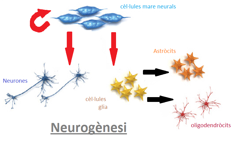 neurogènesi